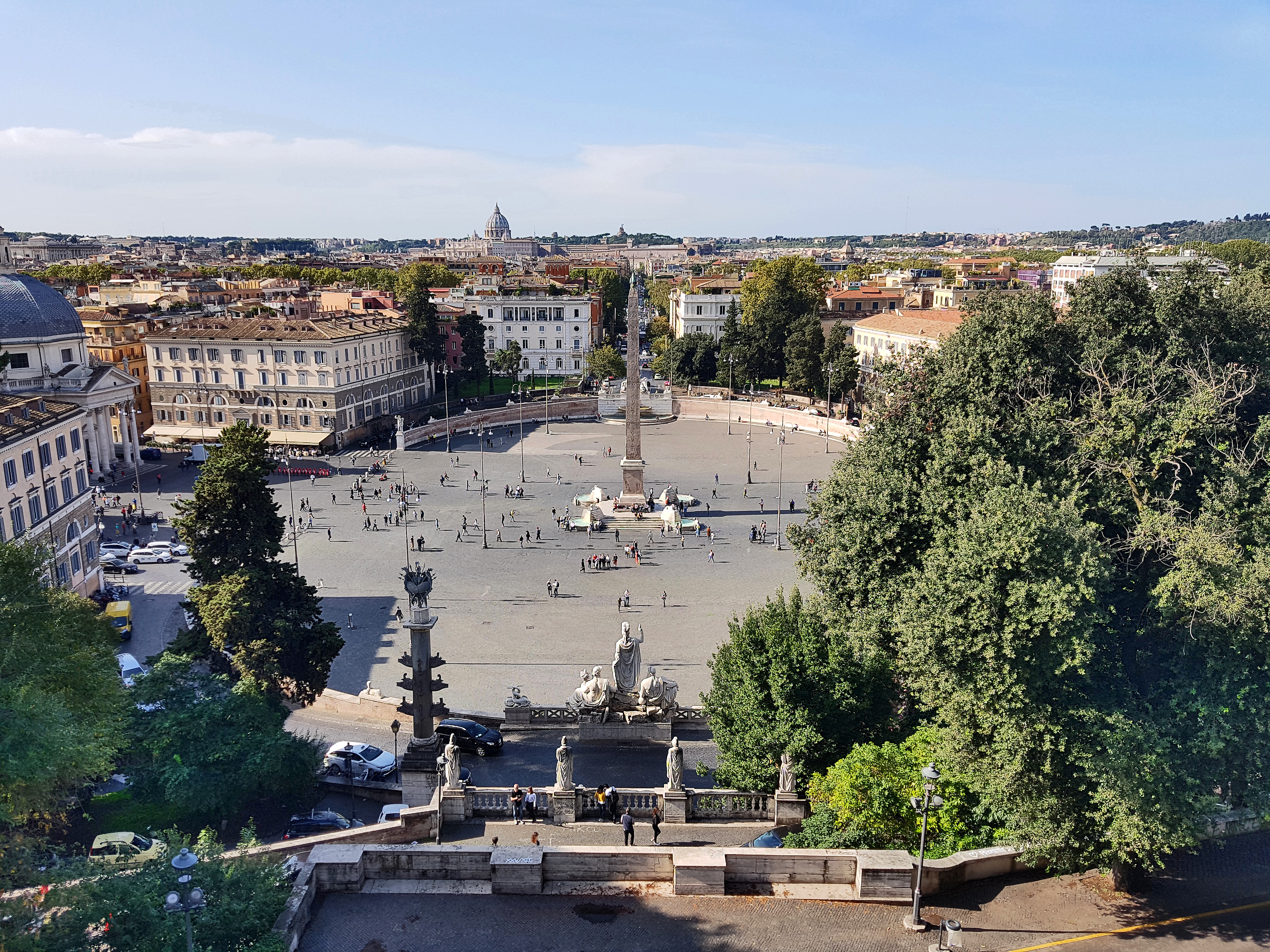 Altägyptischer Obelisk